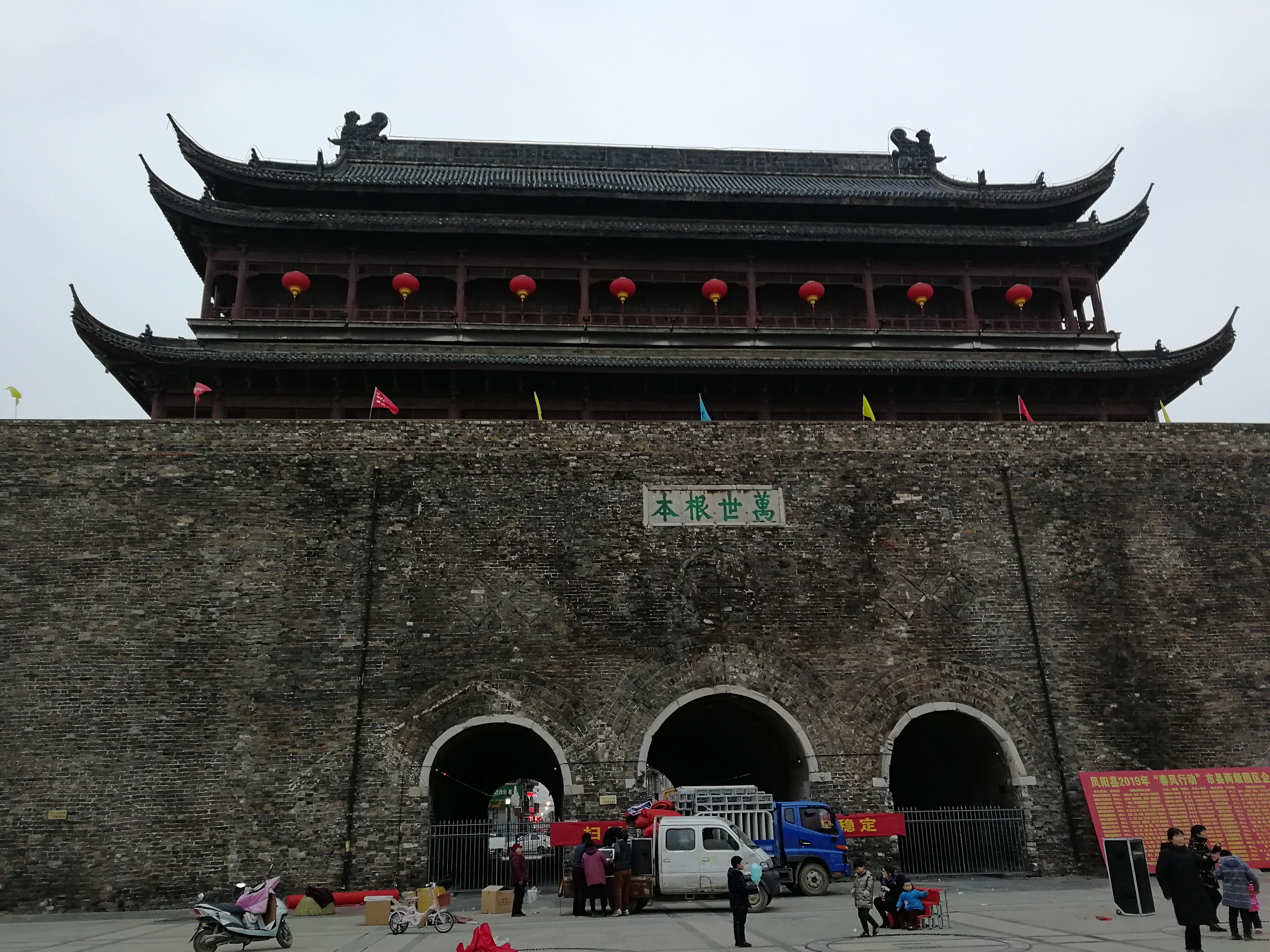 中文（中国大陆）: 凤阳县明中都鼓楼